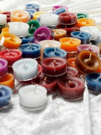 Eget foto